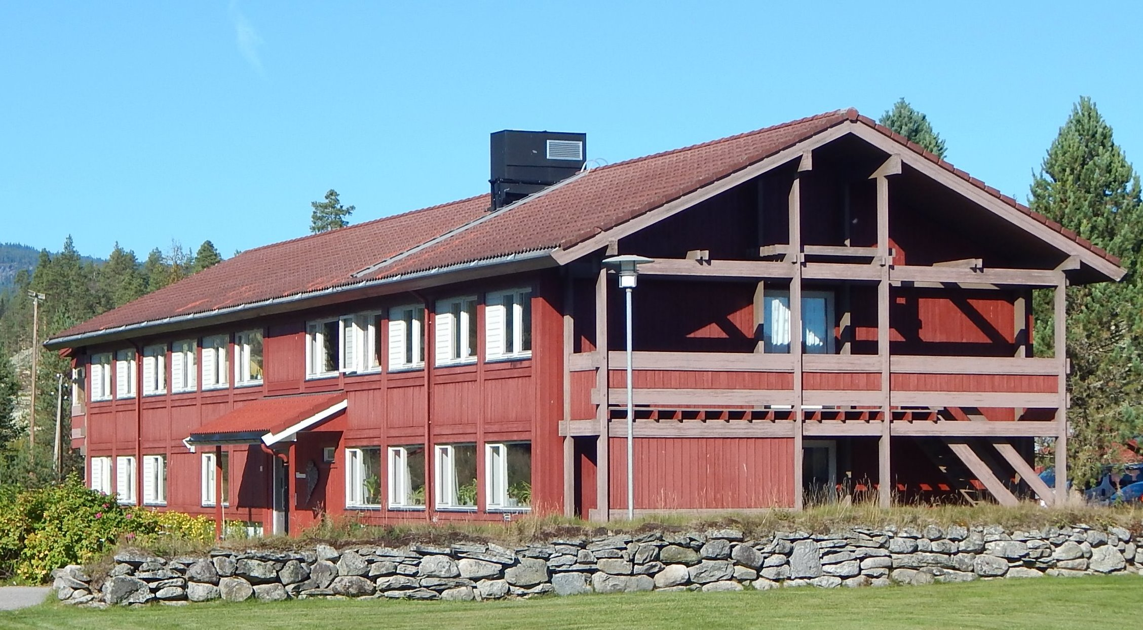 Bygning på området til Midt-Østerdal videregående skole ved Nordstumoen